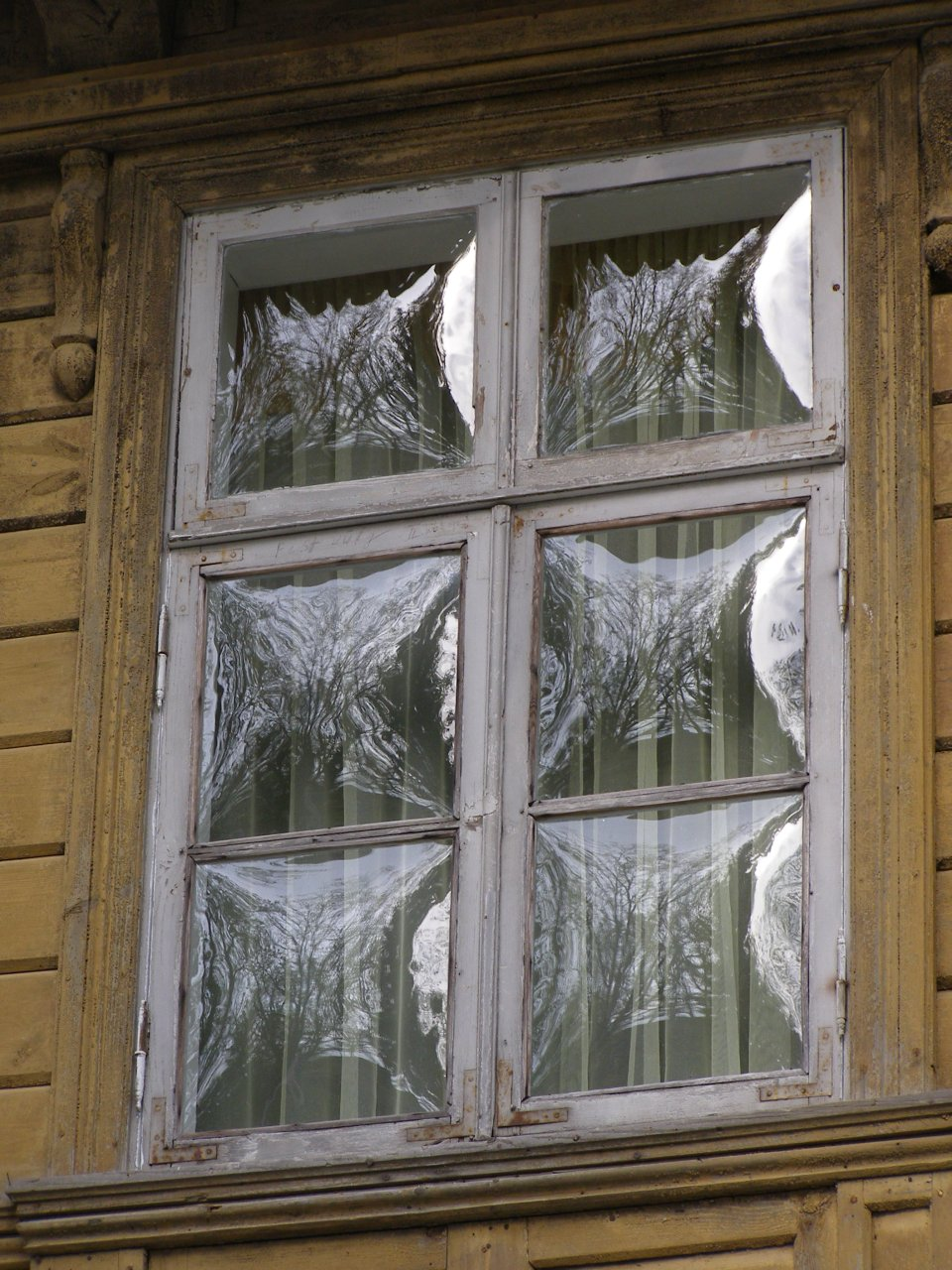 Võidula mõisa peahoone kumerate klassidega aken